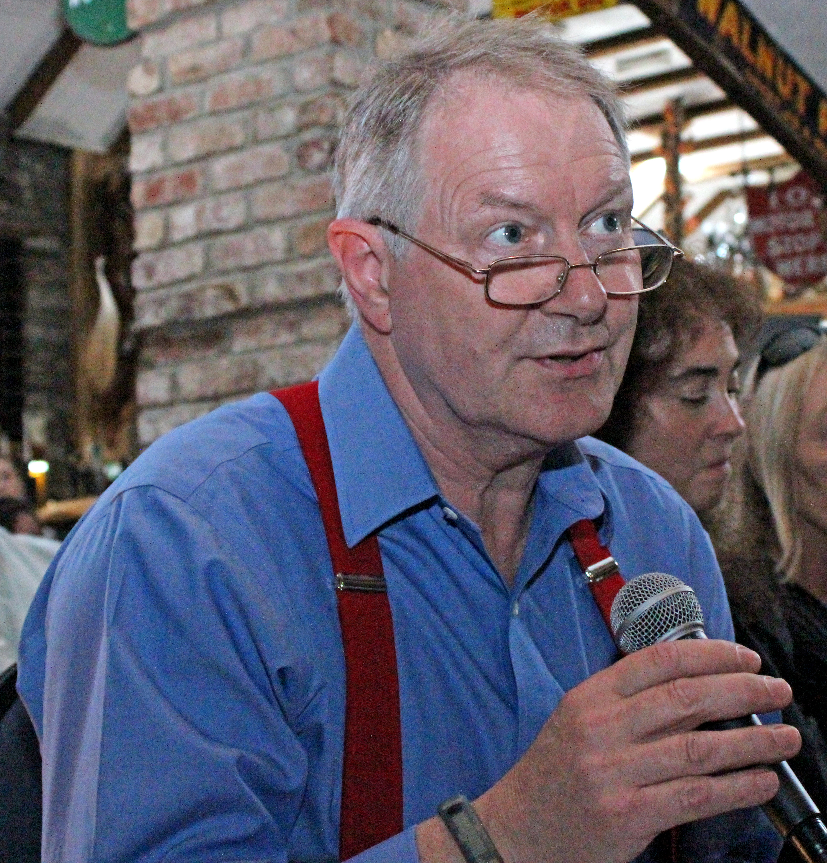 Roy Greenslade, Sinn Féin Summer School